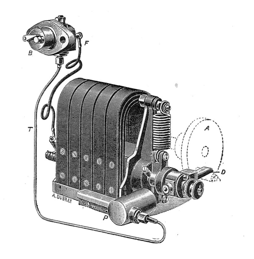 Niederspannungs Abschnapp - Abreißzündung. Hier im Bild ohne Abreißgestänge dargestellt. Dieses schlägt den Hebel B (oben links) im Moment der höchsten Induktion des Zündankers von dem Auflagebolzen weg. Es entsteht ein Abreißfunken. Dieses Bauteil (oben links) befindet sich im Zylinderkopf montiert, dort wo heute die Zündkerze sitzt.